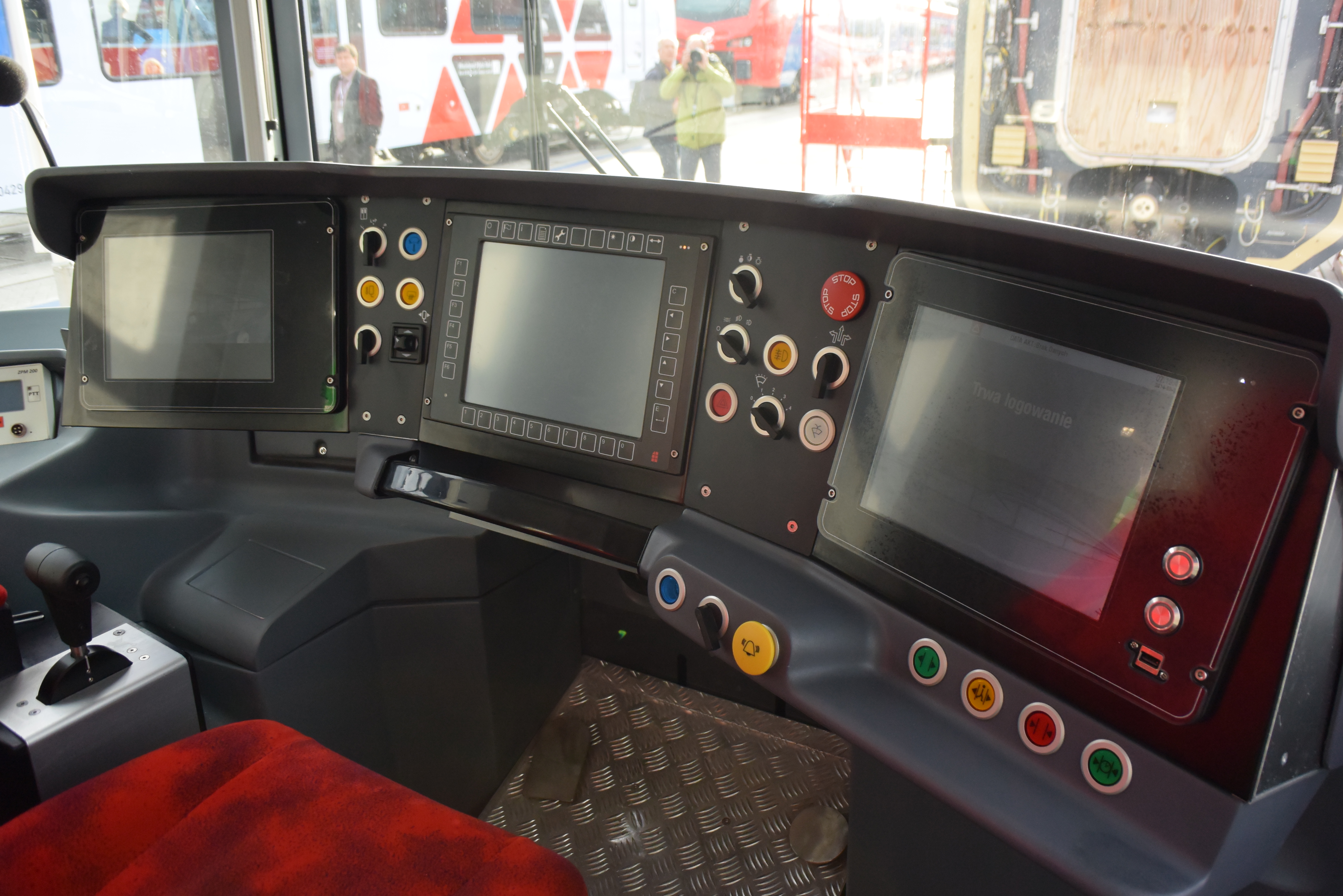 PESA Jazz podczas InnoTrans 2014